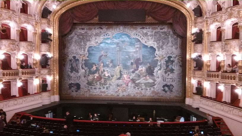 Státní opera Praha, replika původní opony z Nového německého divadla,instalovaná při rekonstrukci divadla v rove 2019